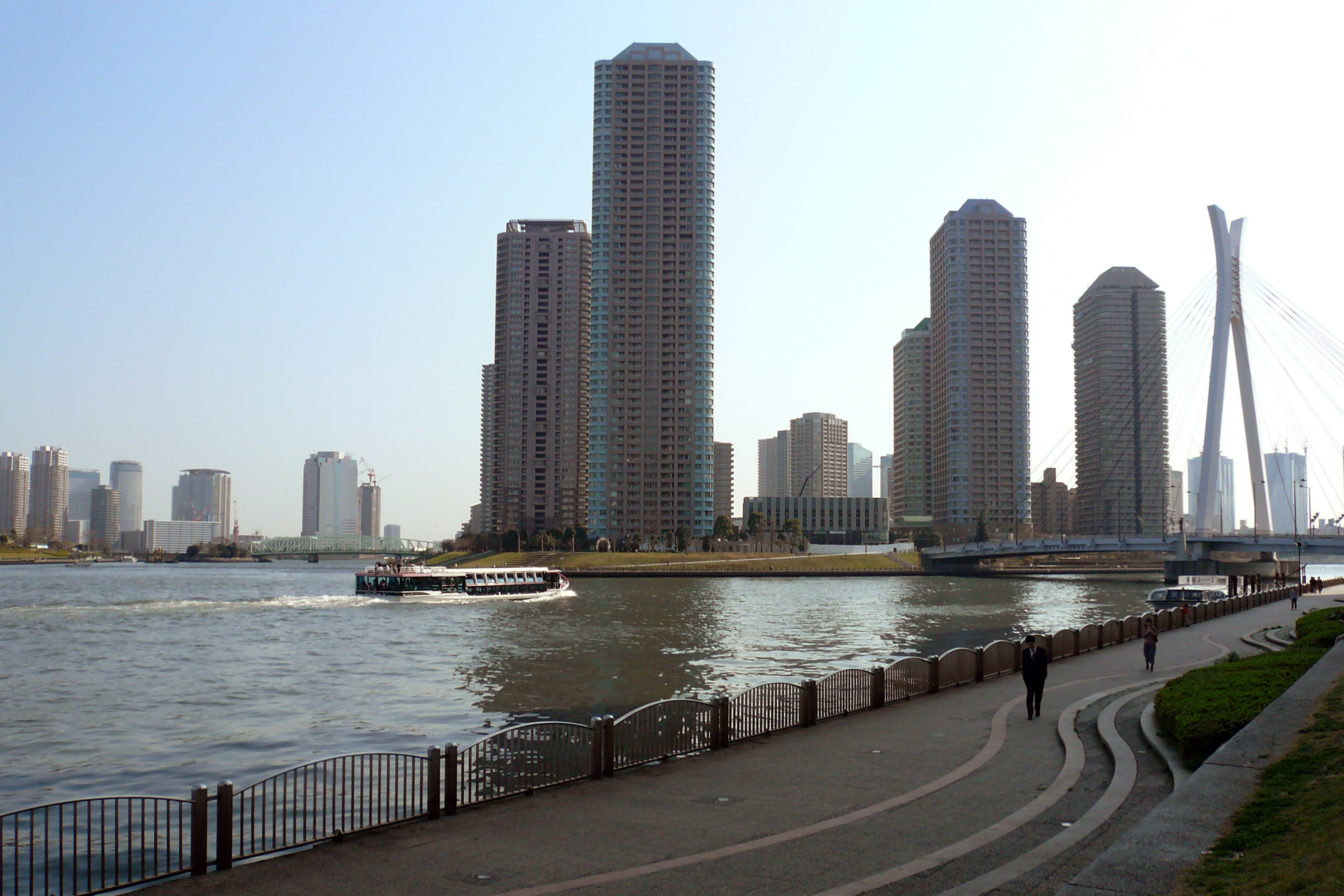 Sumida River at Shinkawa in Chuo-ku, Tokyo, Japan